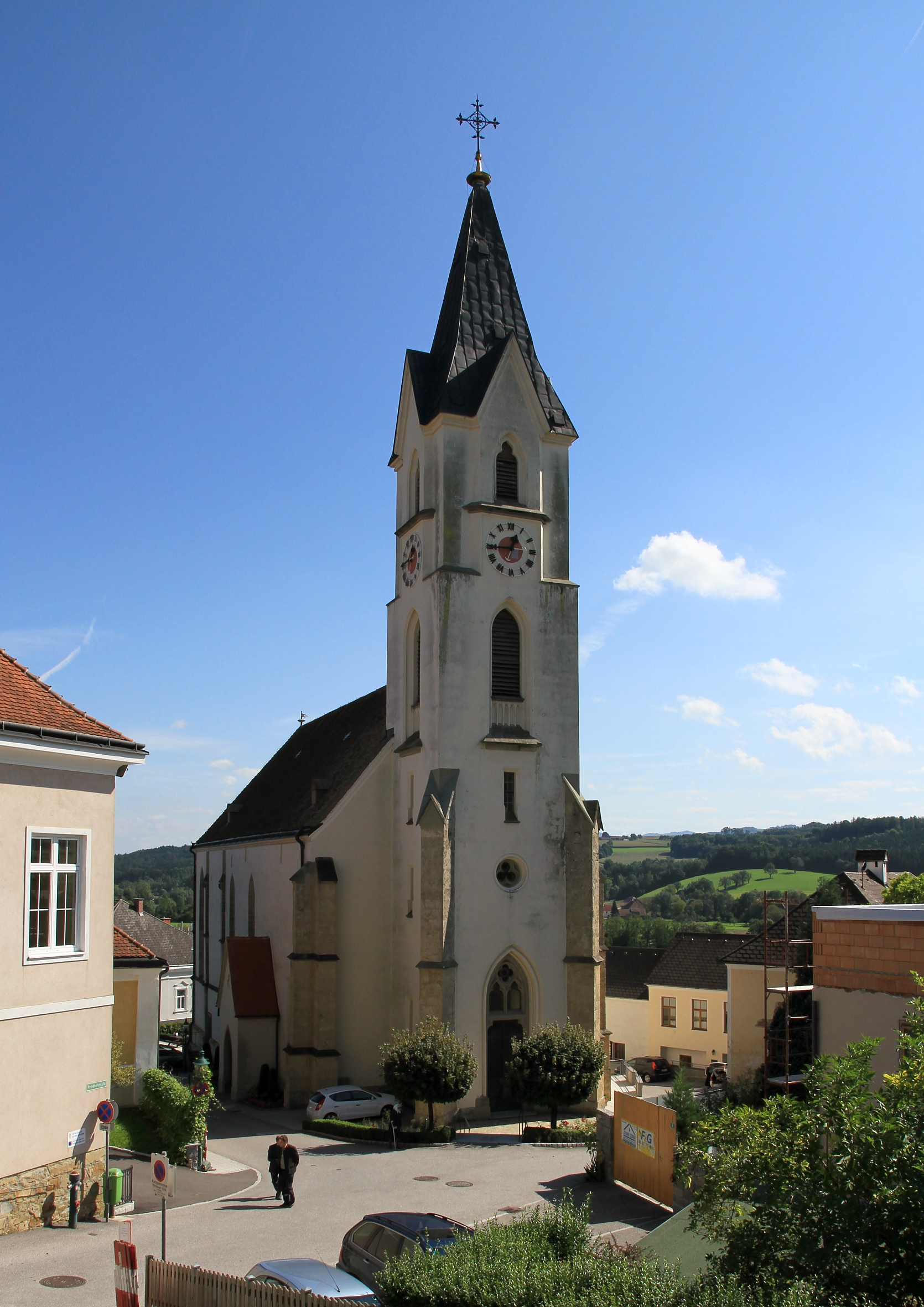 Katholische Pfarrkirche hl. Michael in der niederösterreichischen Marktgemeinde Steinakirchen am Forst.